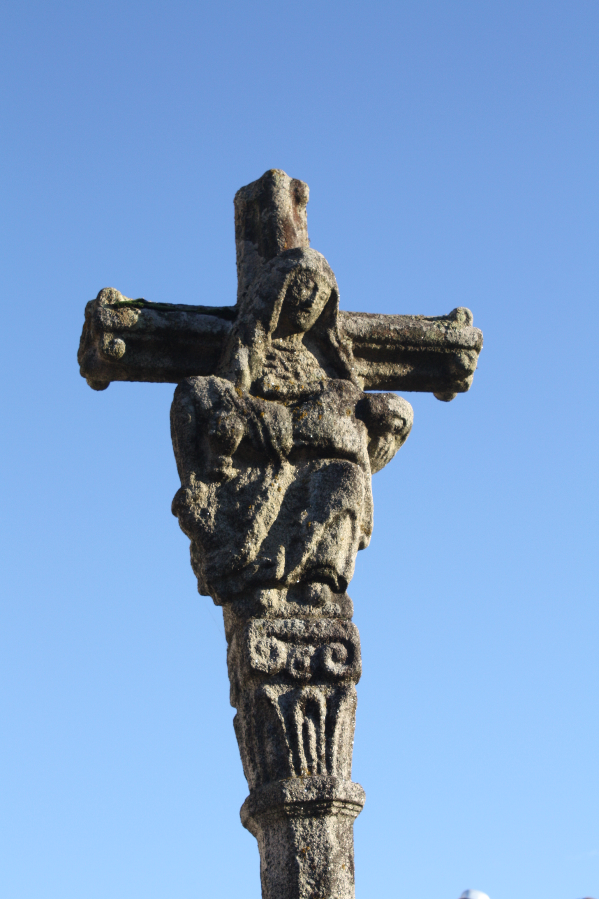 Cruceiro do Ribeiro, na parroquia de Corvillón, concello de Cambados (Pontevedra)